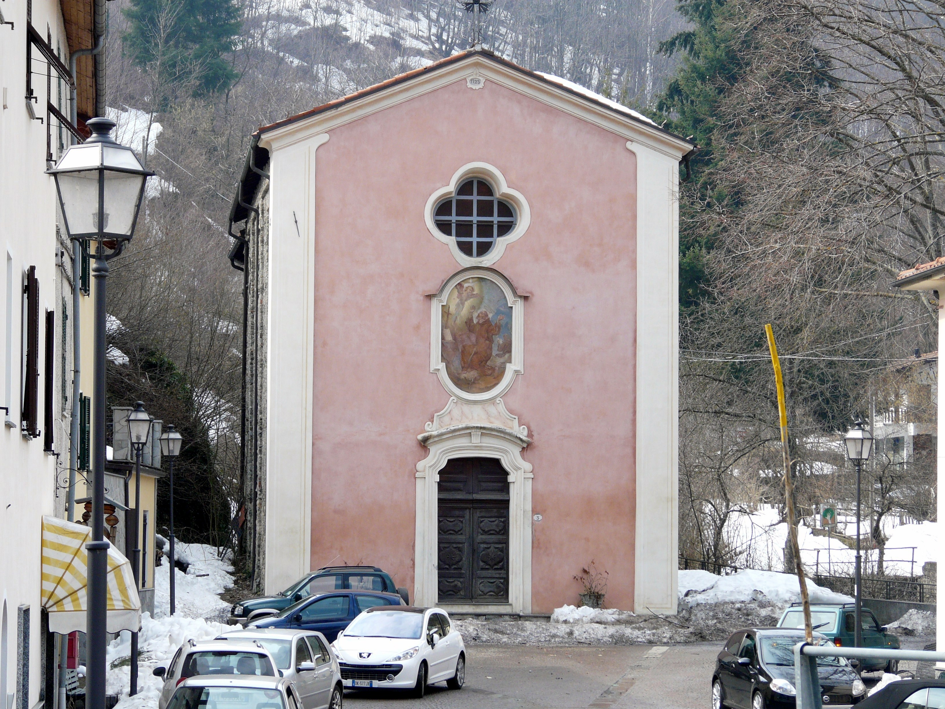 Oratorio di San Francesco, Osiglia, Liguria, Italia